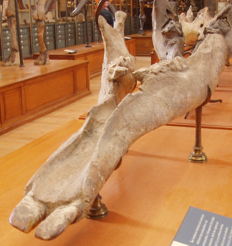 Archaeobelodon filholi mandible